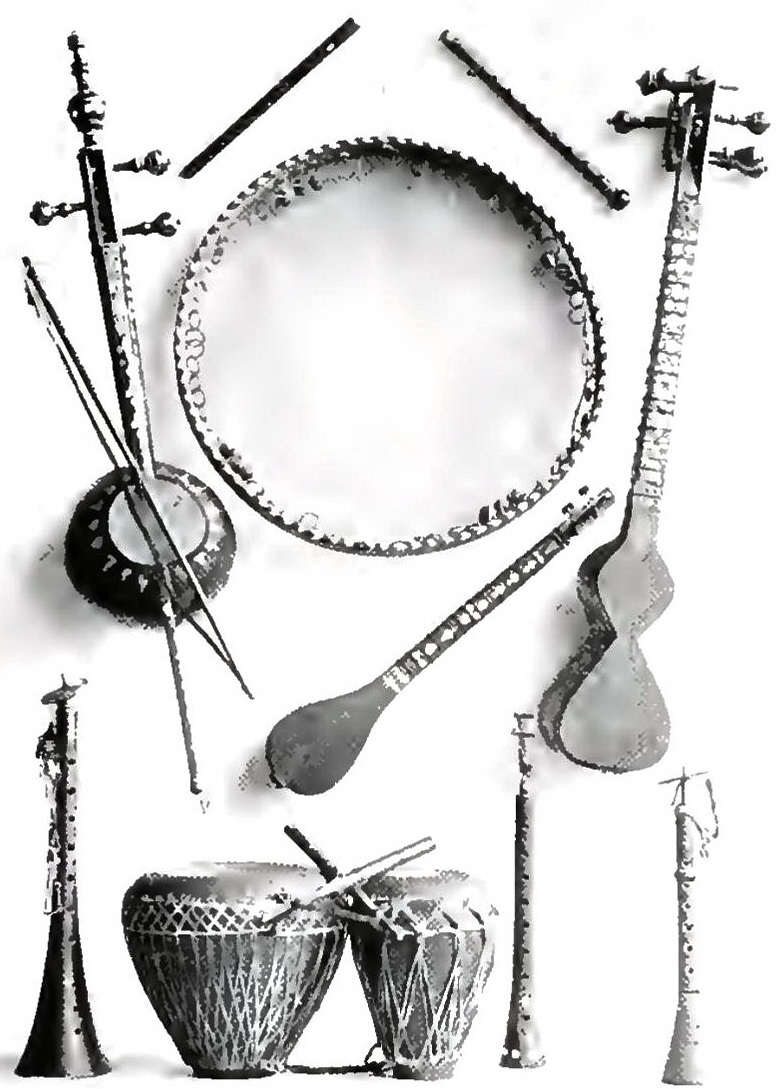 Georgische Musikinstrumente.